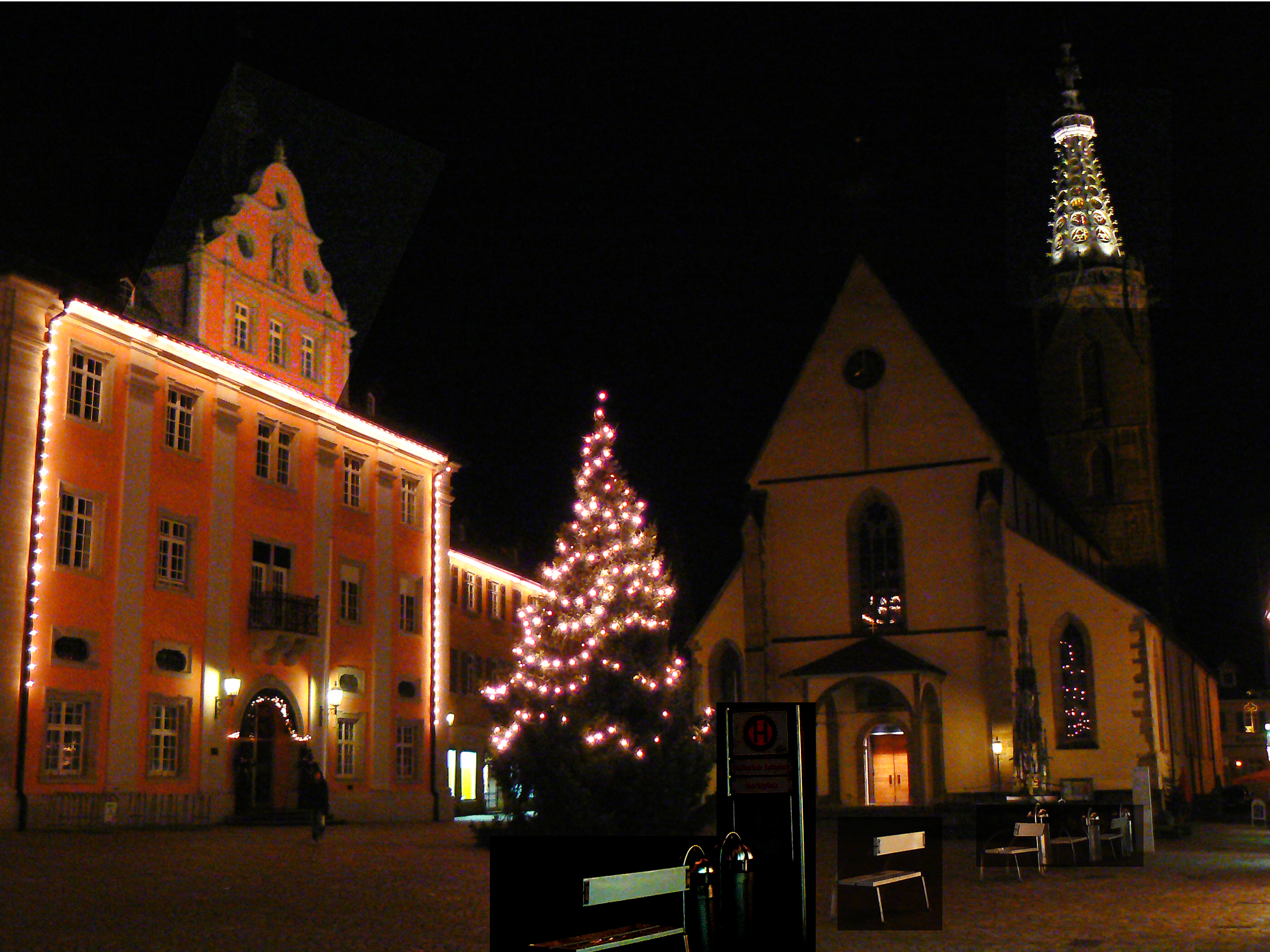 Rottenburg am Neckar - Marktplatz mit Rathaus und Dom